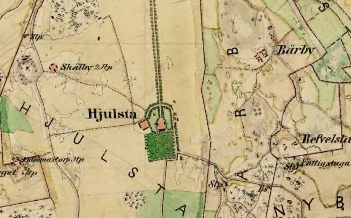 Hjulsta säteri på Häradsekonomiska kartan